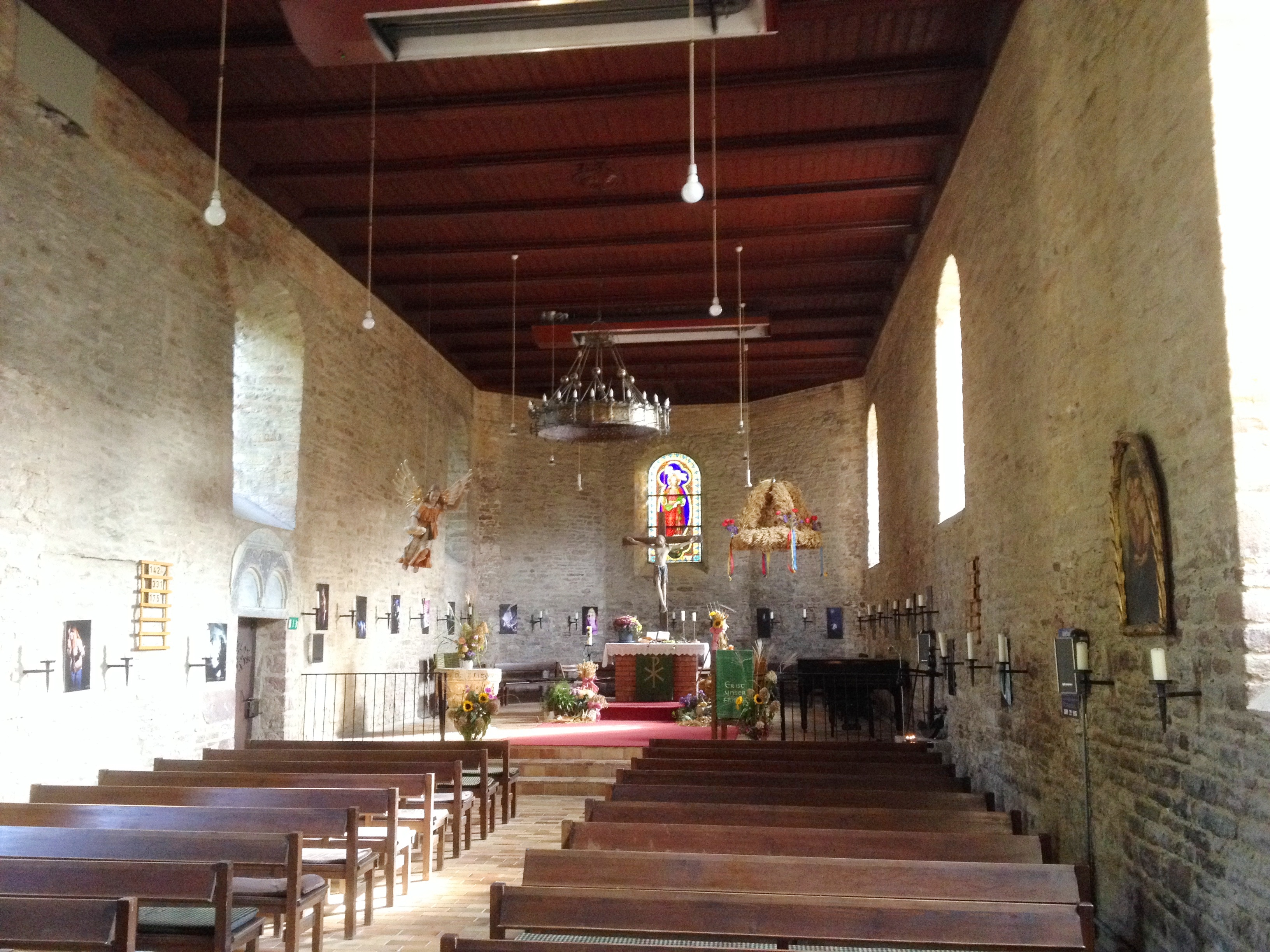 Ilsenburg, ev. Marienkirche, Inneres im Oktober 2019